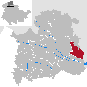 Gemeinde Urbach in Thüringen, Landkreis Nordhausen